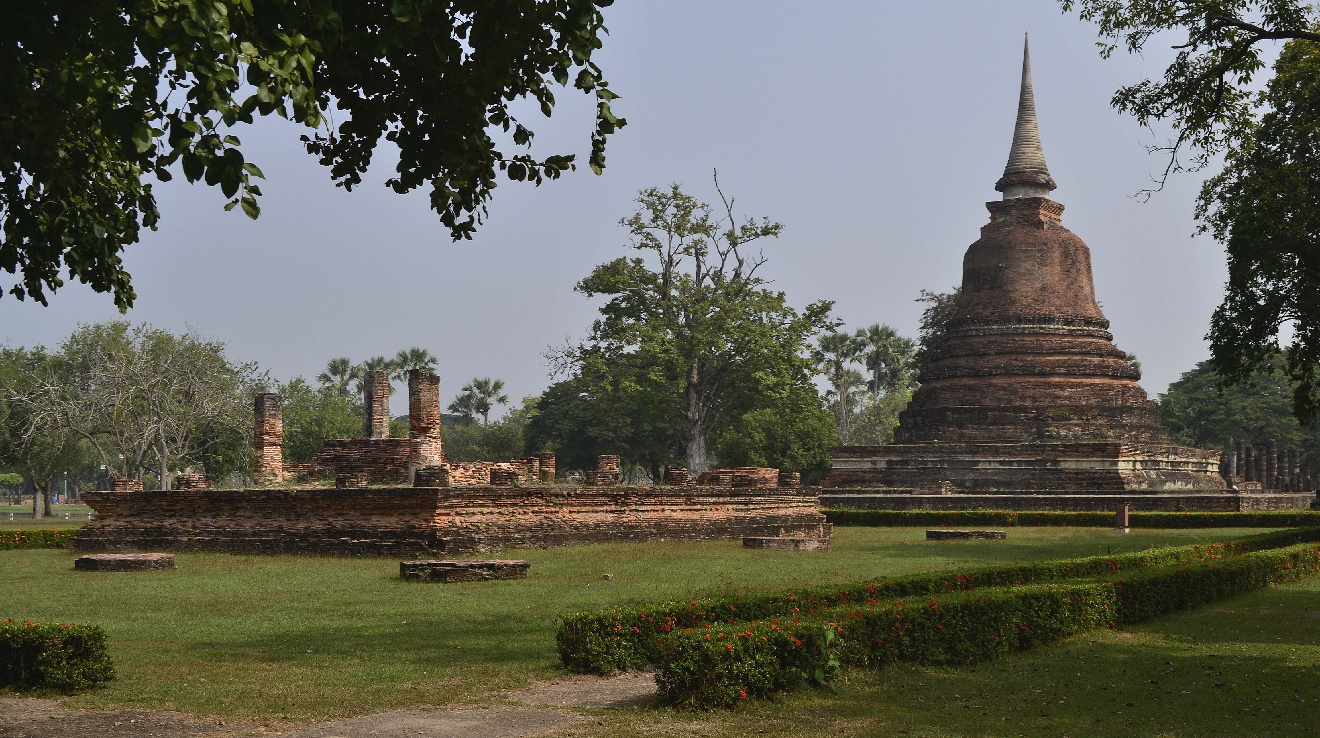 Wat Chang Songkhram im Geschichtspark Sukhothai. Blickrichtung ONO: Ubosot vor Chedi.